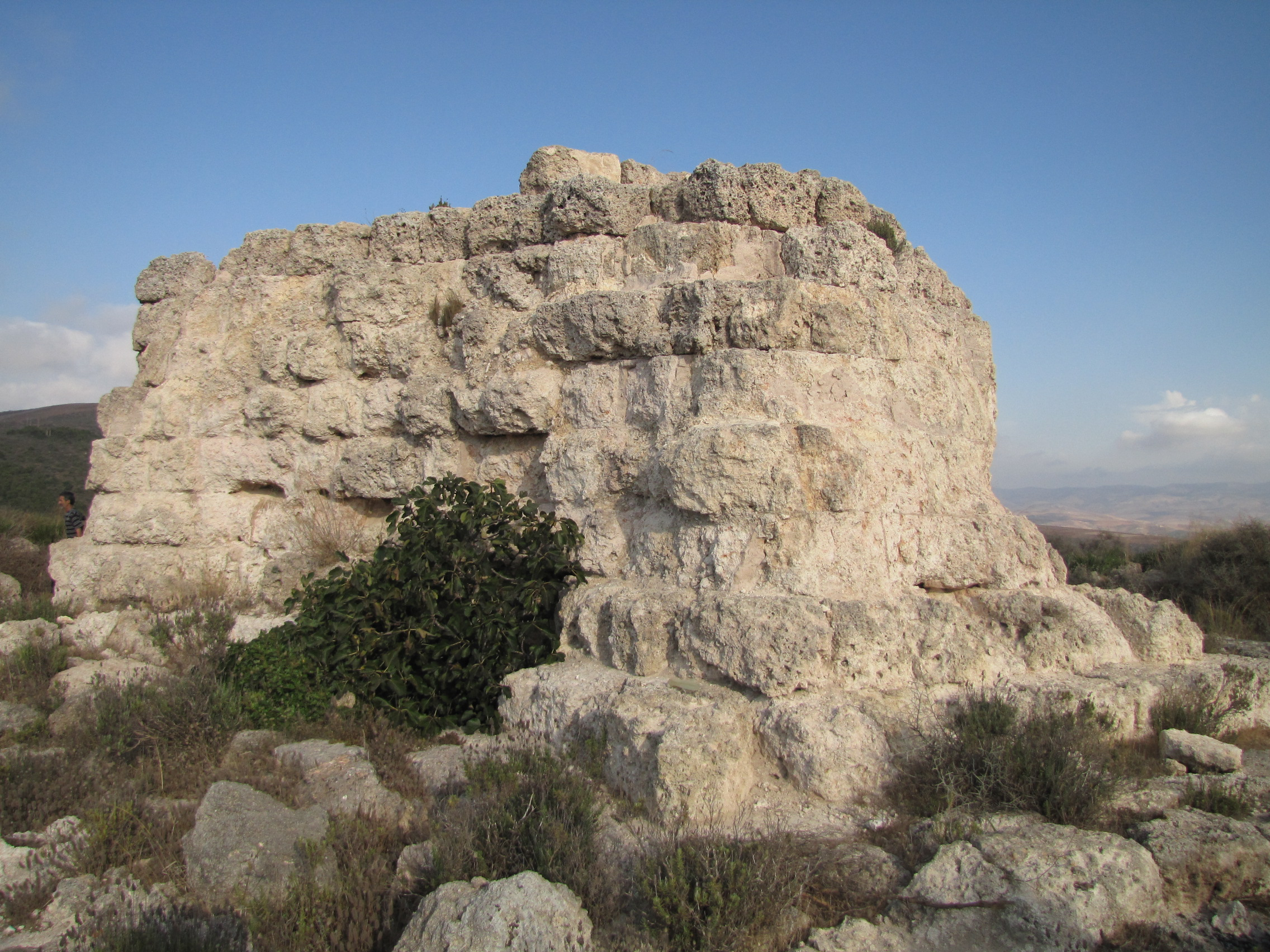 Tombeau de syphax